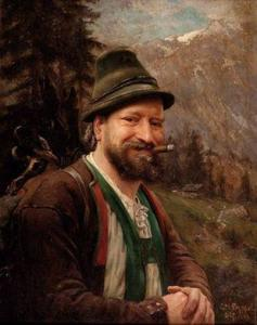 Jägers Freud